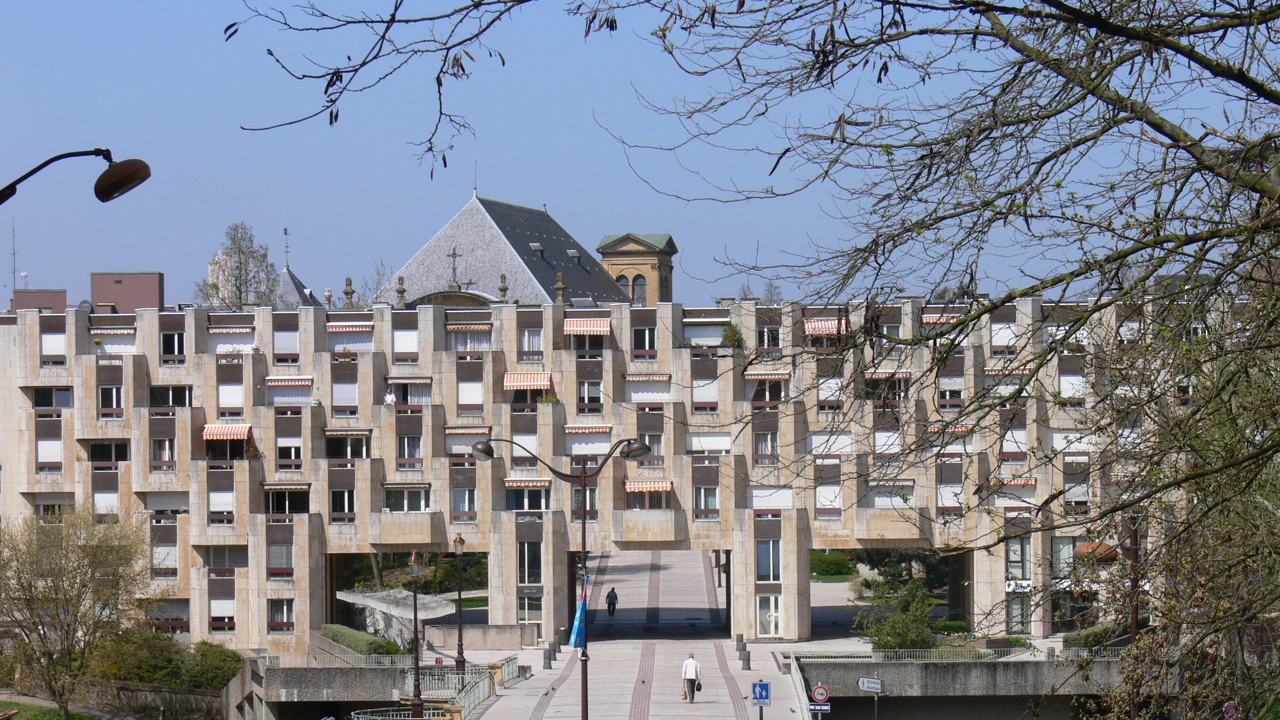 Vue du Pontiffroy et de l'immeuble situé au delà du pont Saint-Georges, en arrière plan l'abbaye Saint-Clément